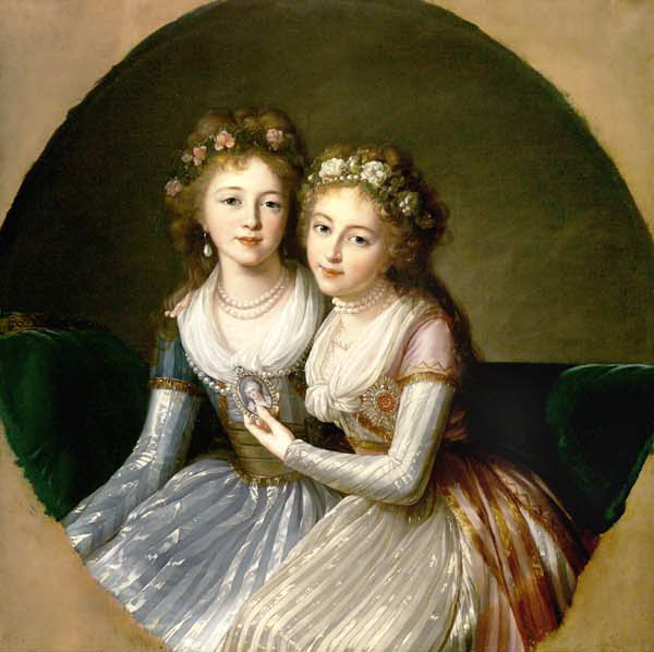 Großfürstin Helene Pawlowna und Großfürstin Alexandra Pawlowna; Doppelporträt mit Katharinen-Orden und kaiserlicher Porträtminiatur von Katharina II. im Diamant-Rahmen, das sitzende junge Geschwisterpaar mit Perlen- und Blumenschmuck; Öl auf Leinwand